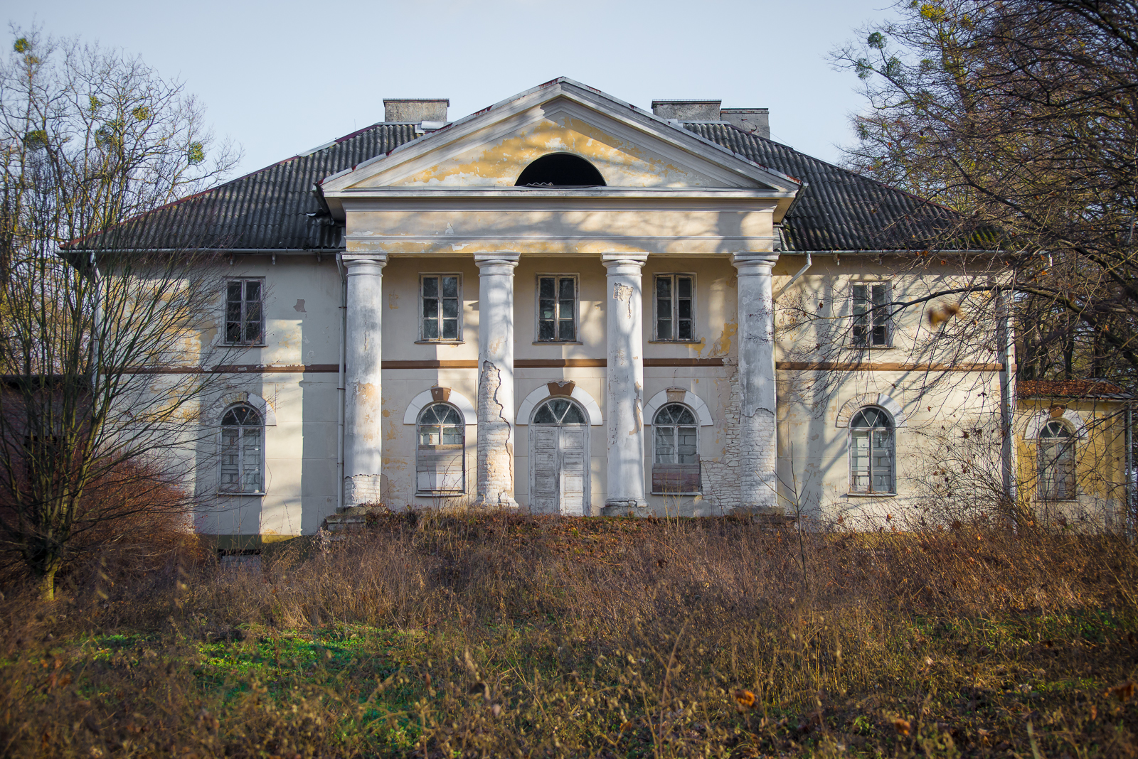 Pałac w Olszance od strony południowej